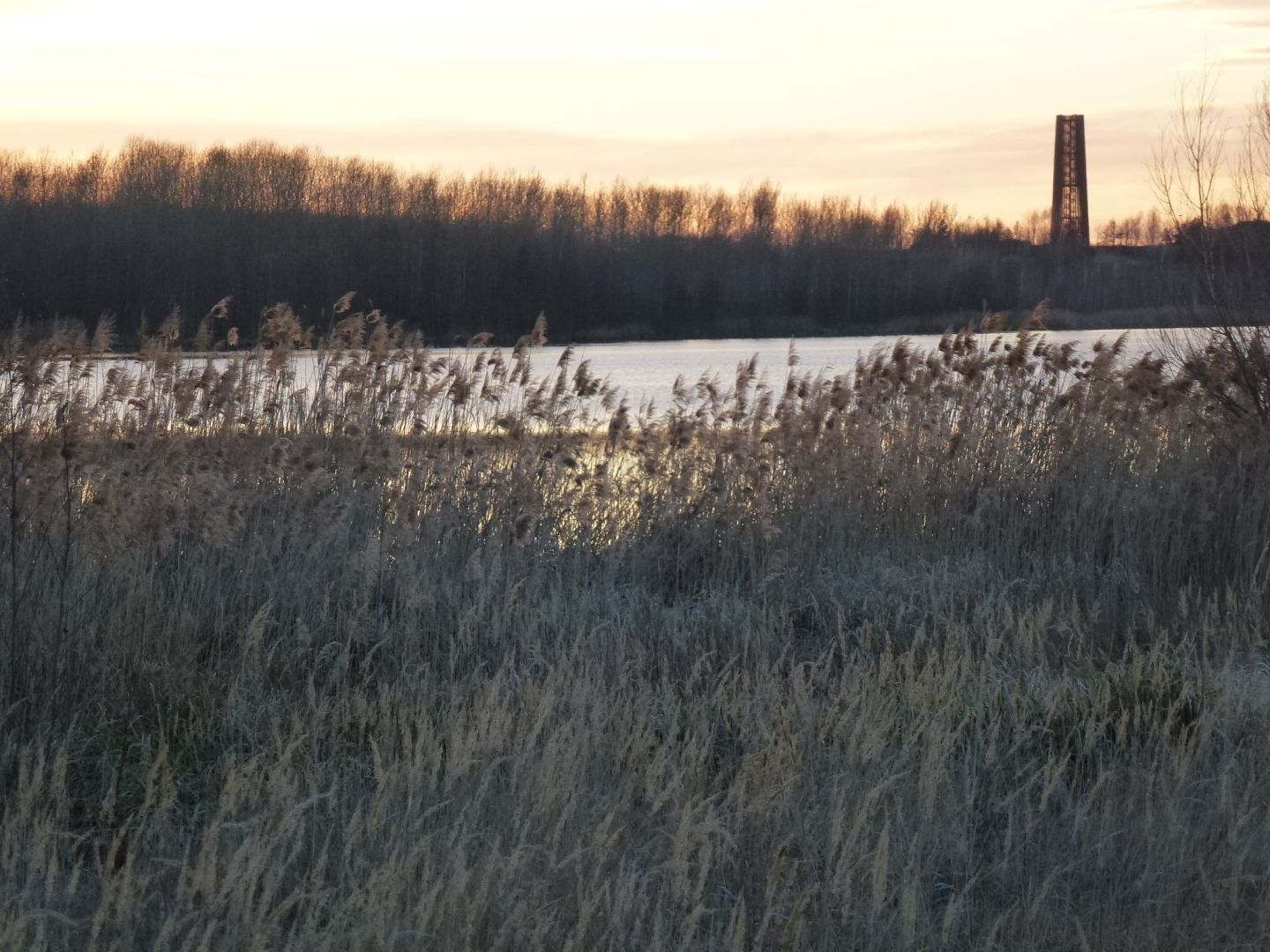 Cospudeneer See mit Blick zur Bistumshöhe